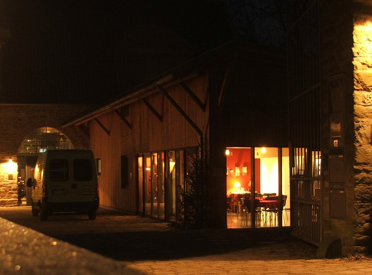 Museumscafe Schloss Werdringen Hagen